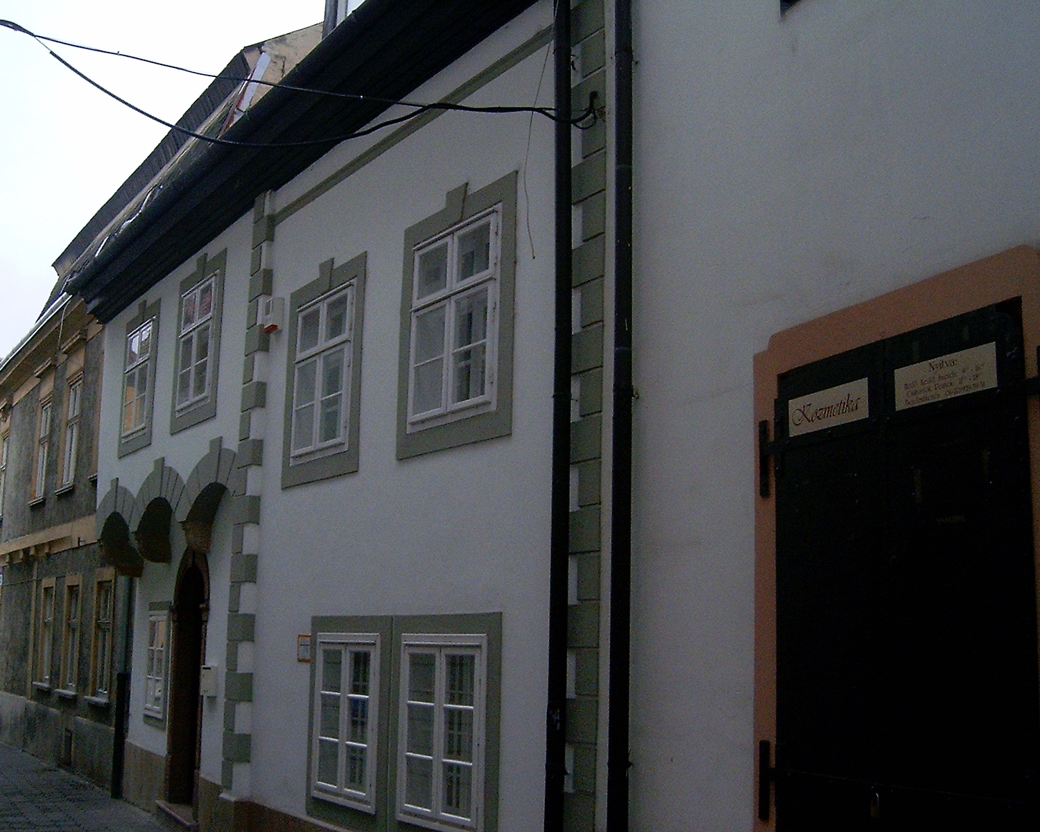 Középkori eredetű lakóház Győrött a Gyógyszertár utcában, saját kép